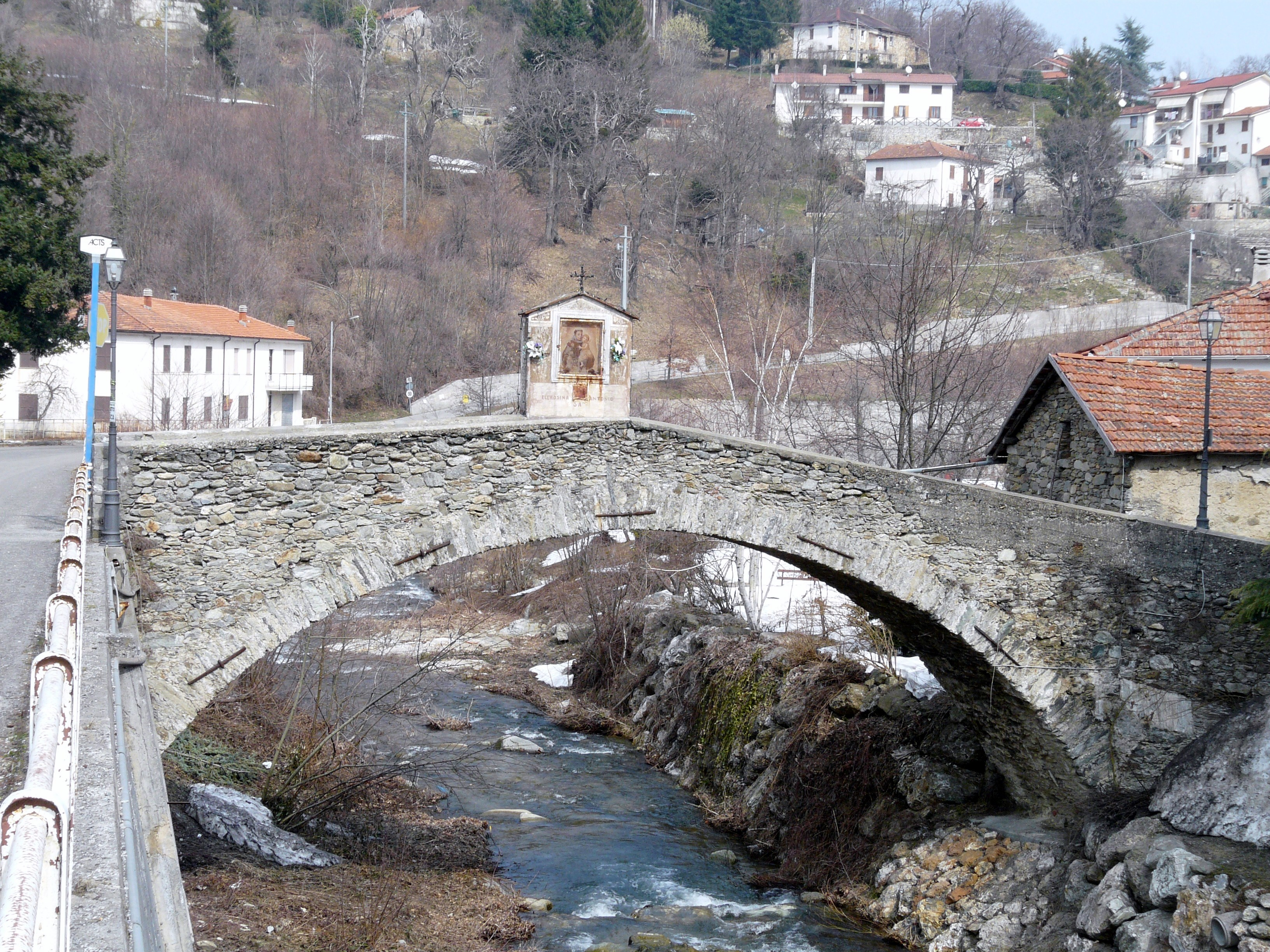 Ponte sul torrente Osiglietta, Osiglia, Liguria, Italia